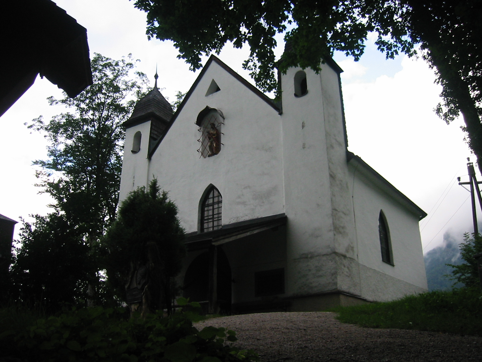 Kalvarienbergkapelle mit Kreuzweg